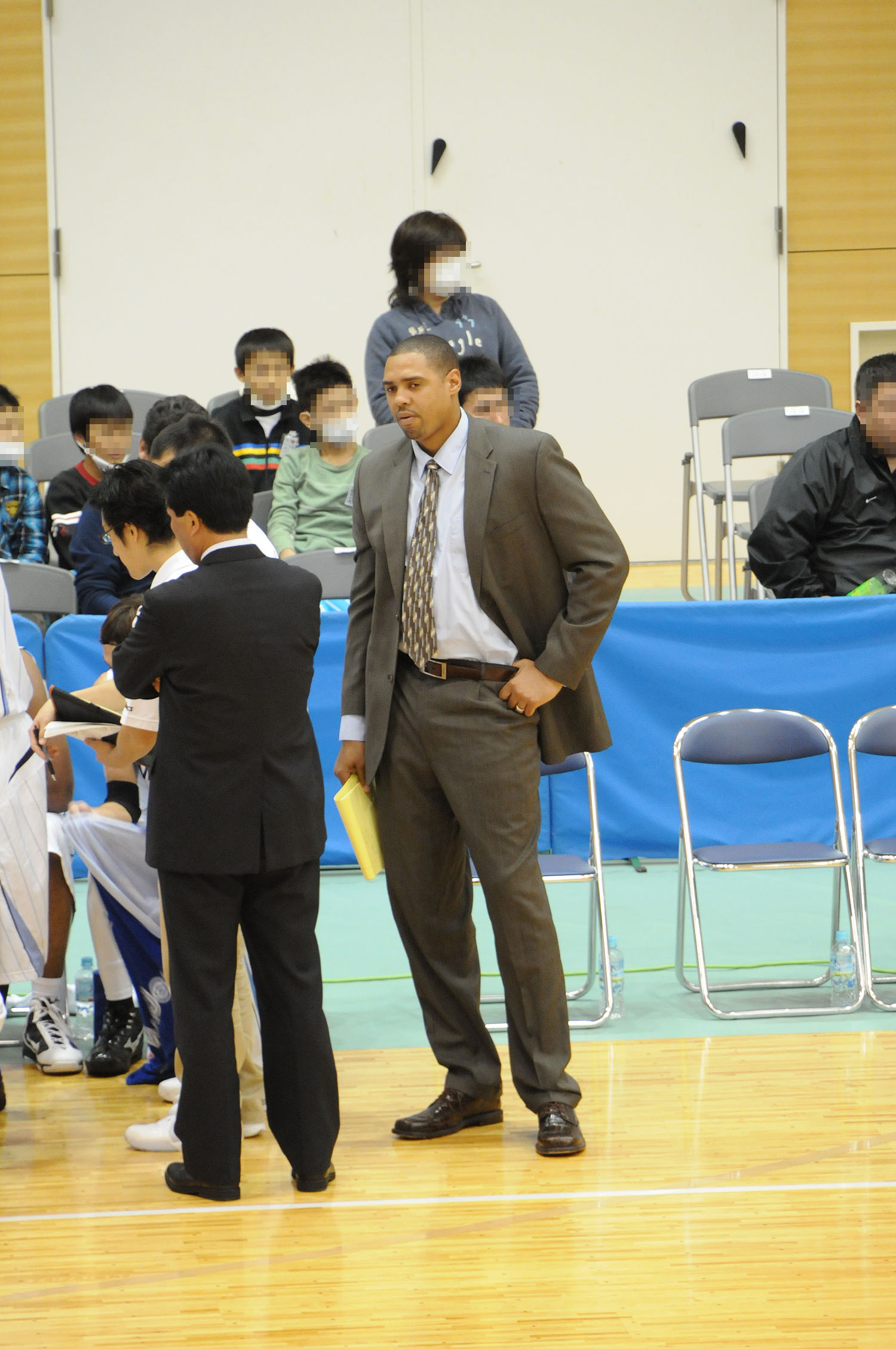 三菱電機ダイヤモンドドルフィンズ、アントニオ・ラングアシスタントコーチ。琴丘総合体育館で。